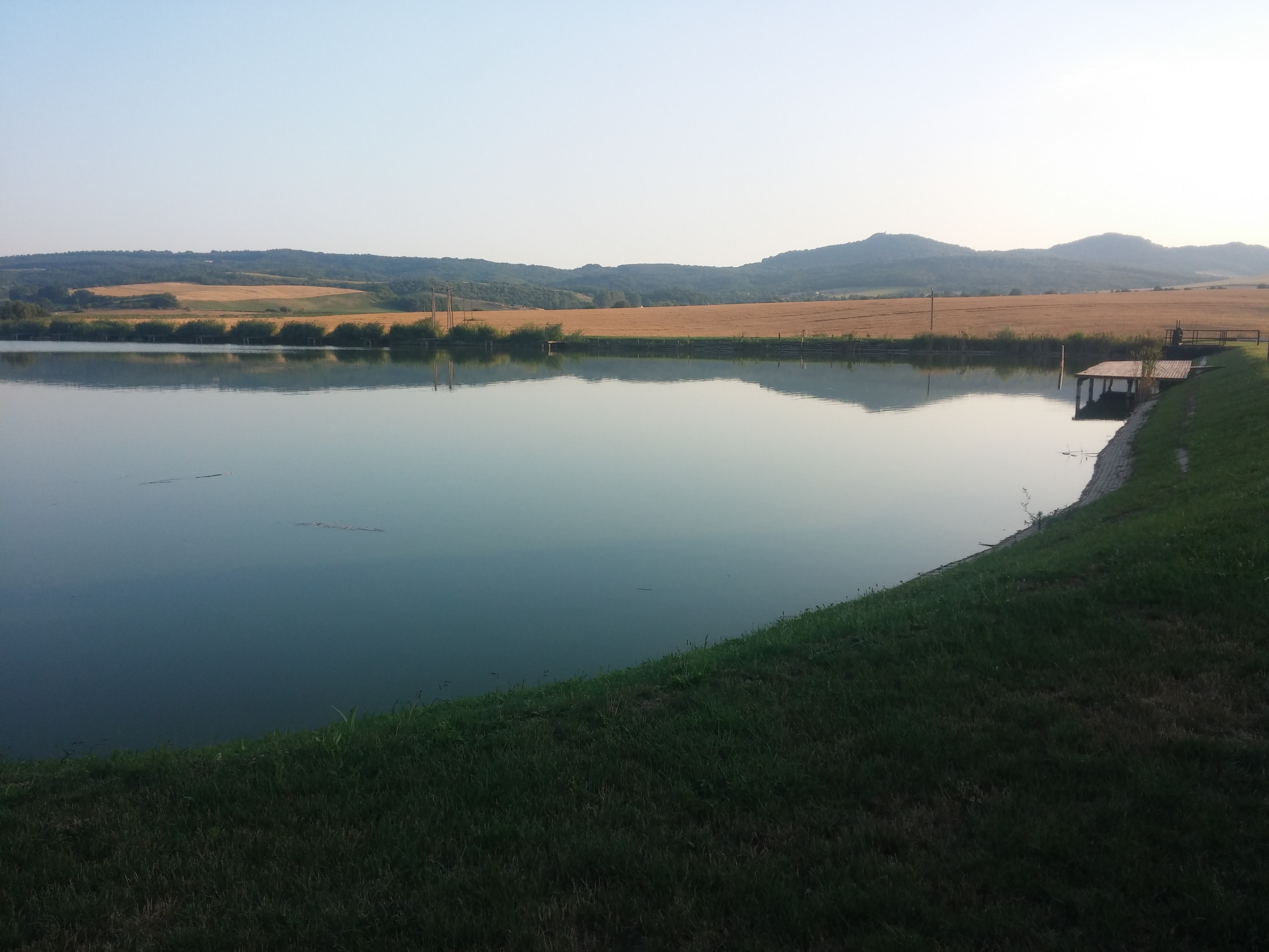 Jurta horgásztó